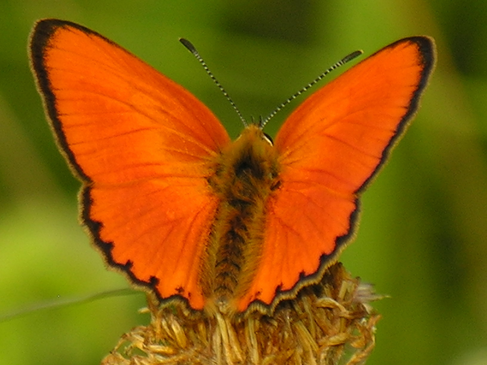 Lycaena virgaureae